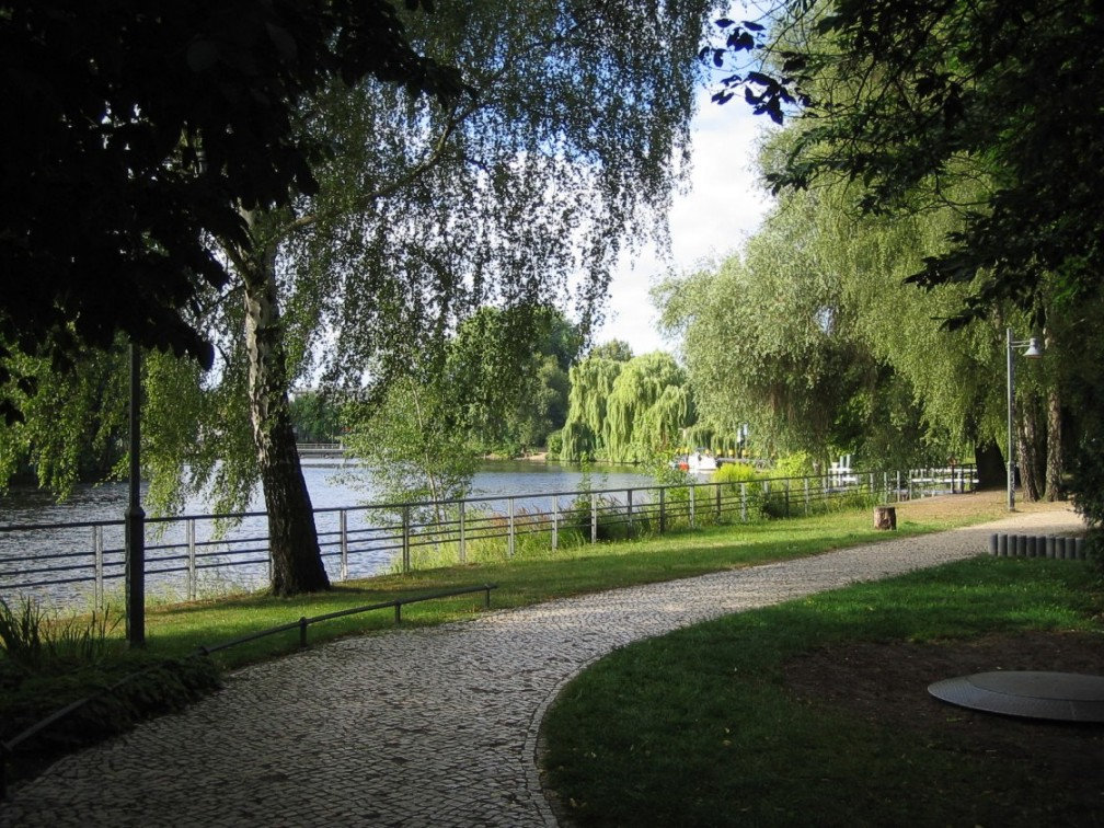 Berlin-Spandau, Wröhmännerpark. Uferweg.